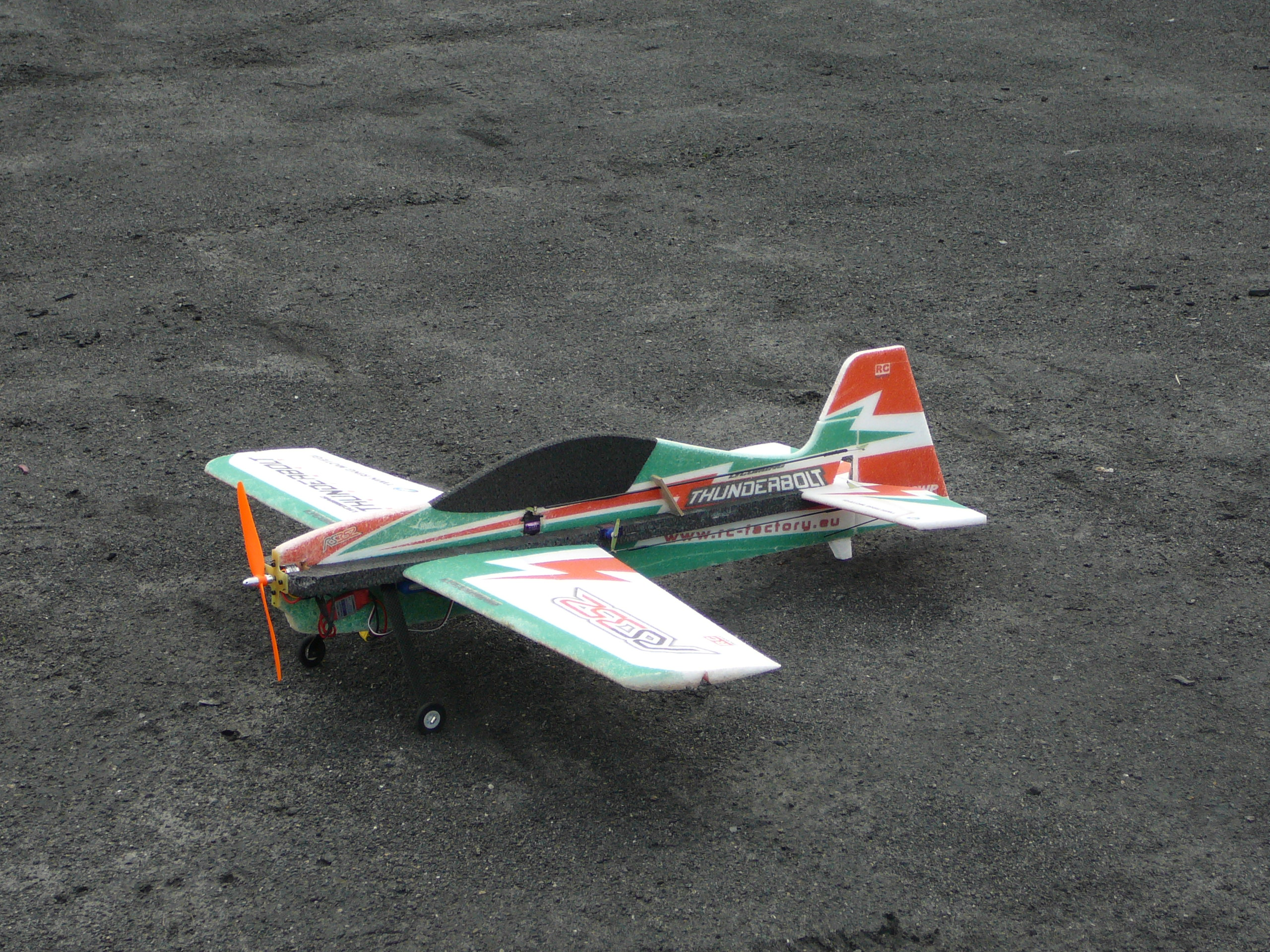 Model zdalnie sterowany (RC), maj 2014